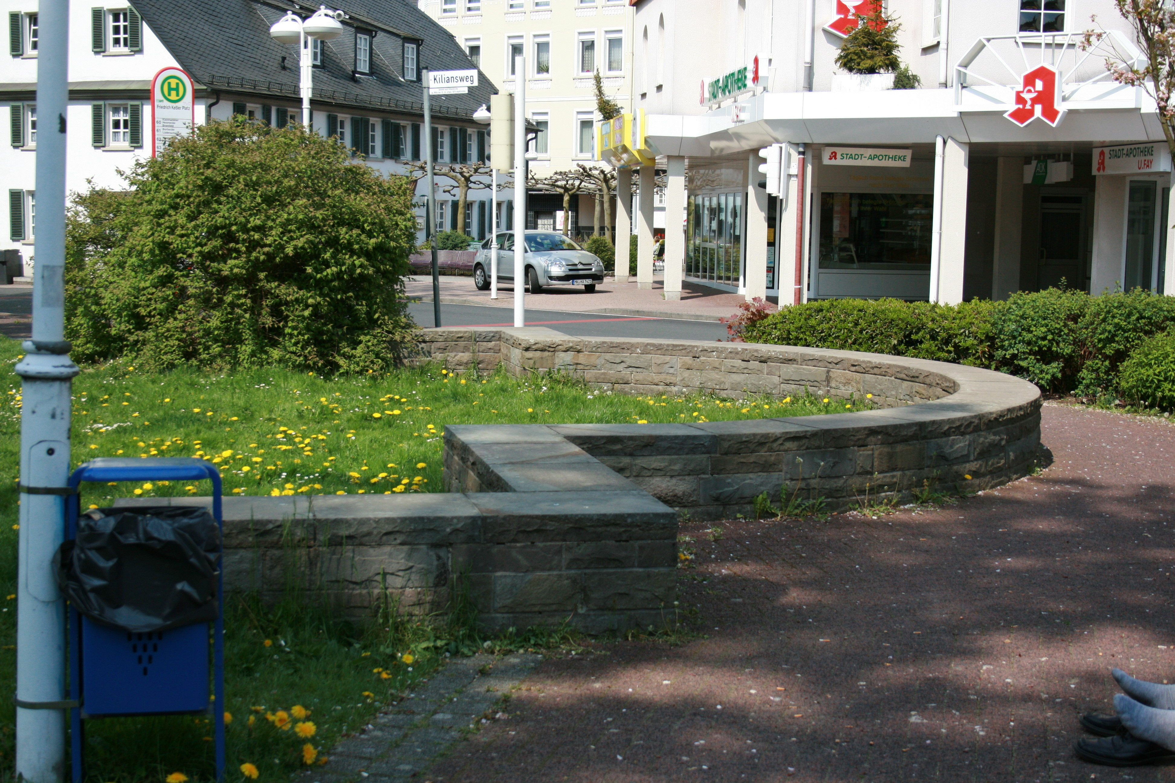 Ehemalige Kilianskirche auf dem Friedrich-Keßler-Platz in Werdohl